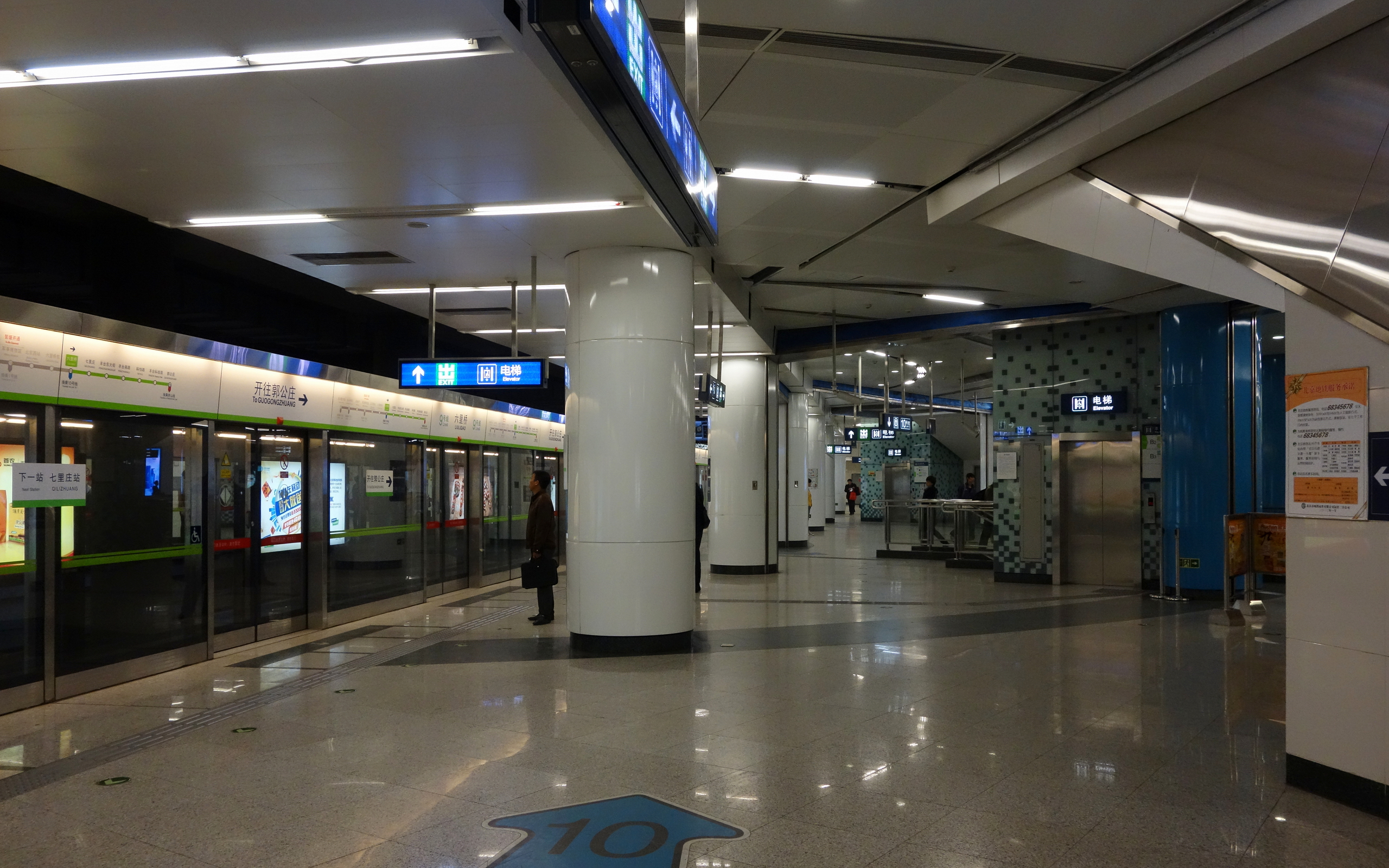 北京地铁9号线侧式站台